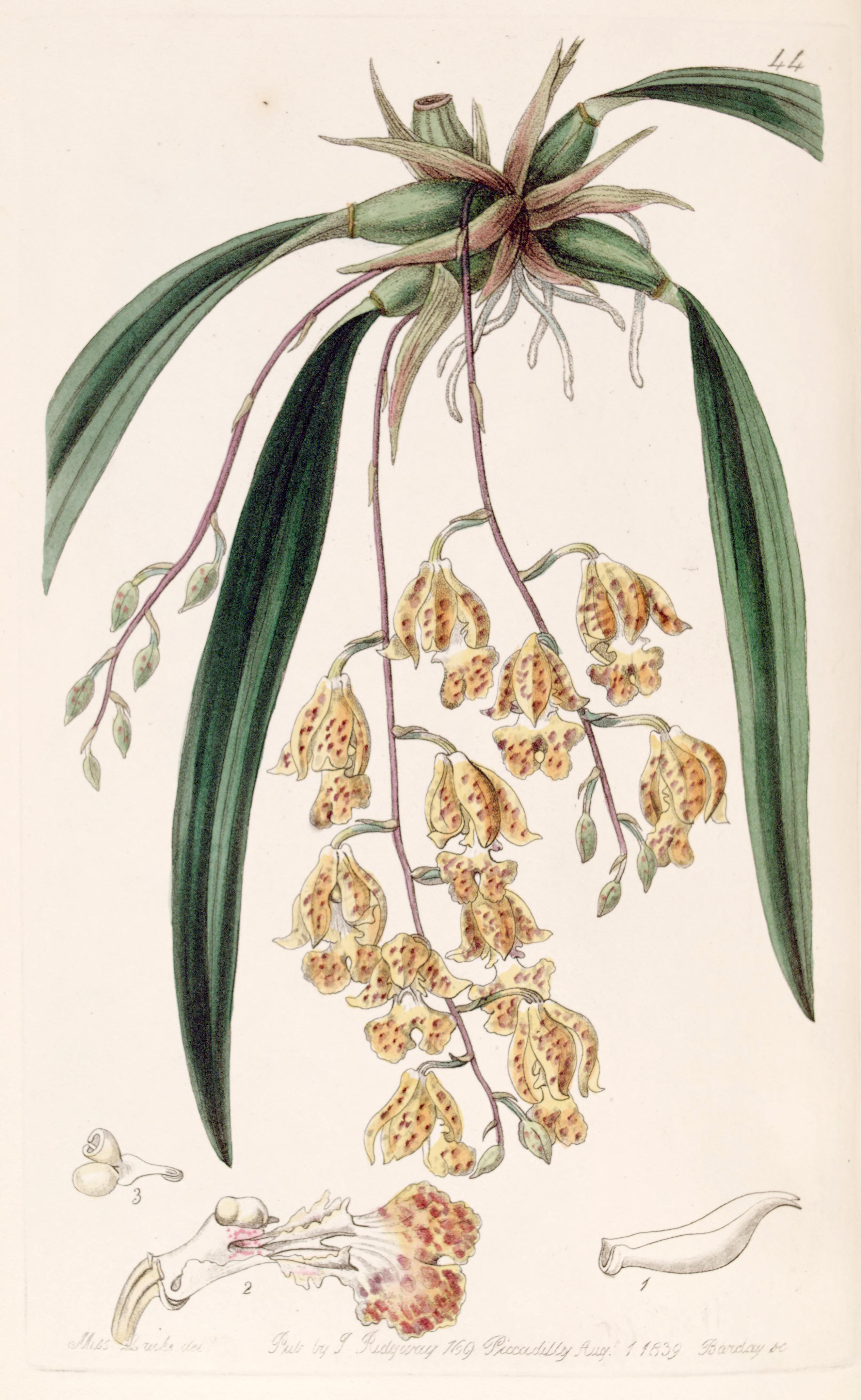 Rodriguezia sticta (as syn. Burlingtonia maculata)